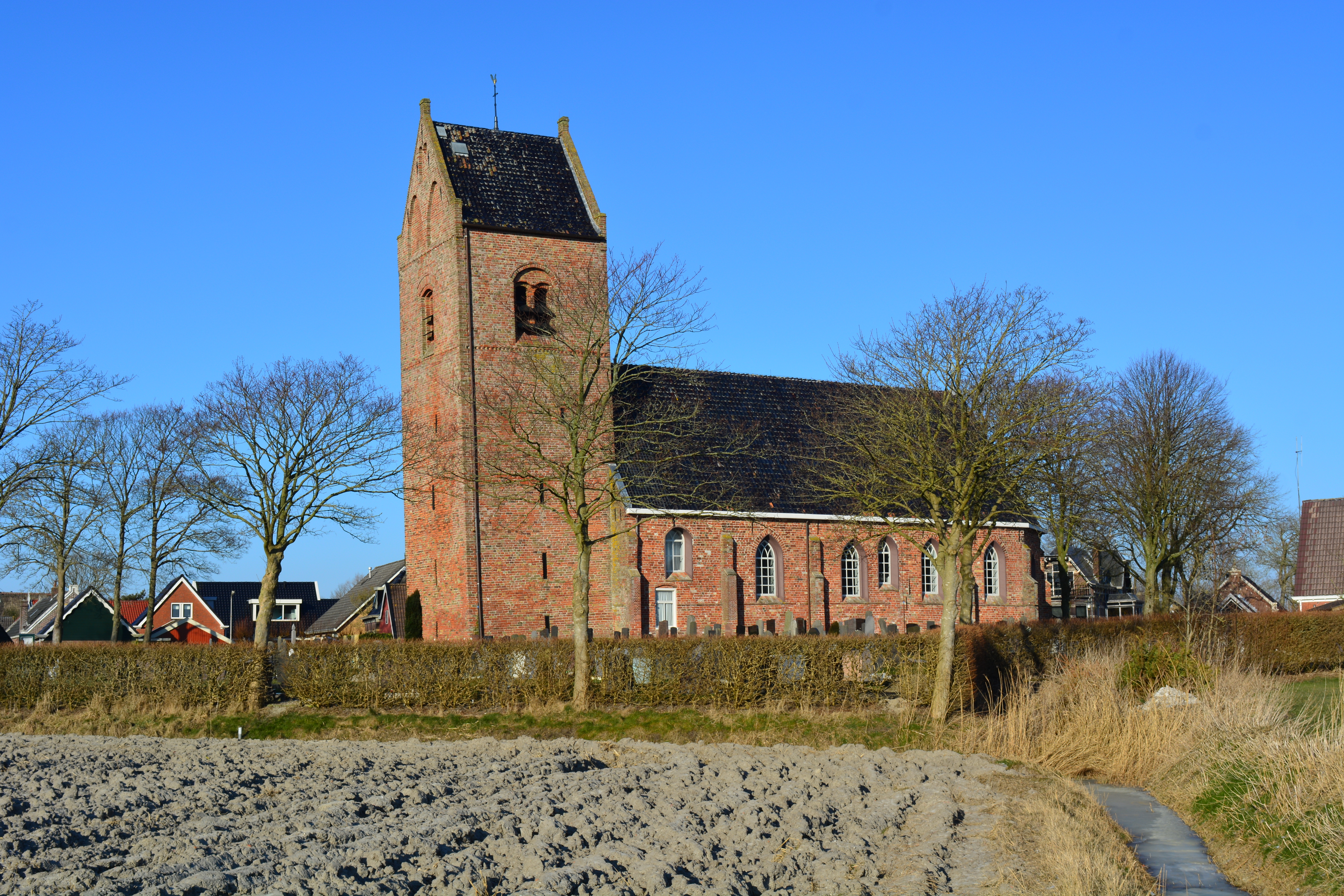 Easternijtsjerk, protestanske Sesiliatsjerke